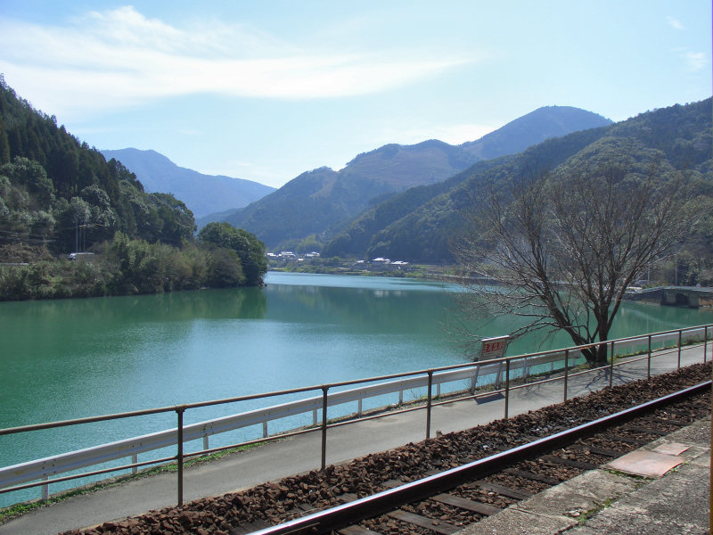 JR肥薩線吉尾駅 駅前風景 ホームから南側を見る。川は球磨川。 撮影者/著者/著作権保有者 : MK Products (本人がアップロード) 撮影日 : 2007/03/01 吉尾駅用にアップロードした画像です。良い画像があれば別の画像に変えてください。